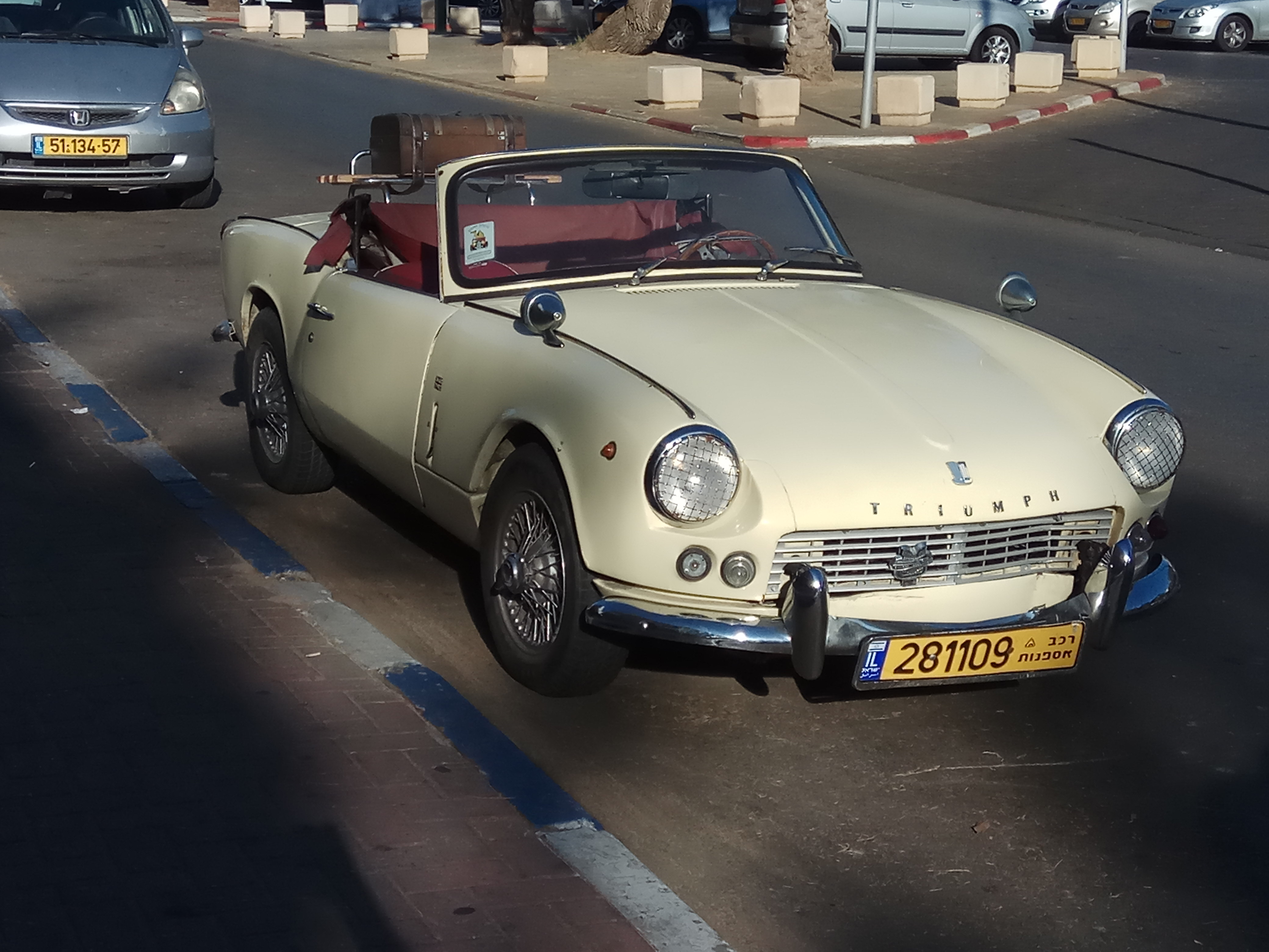 רכב אספנות טריומף בישראל